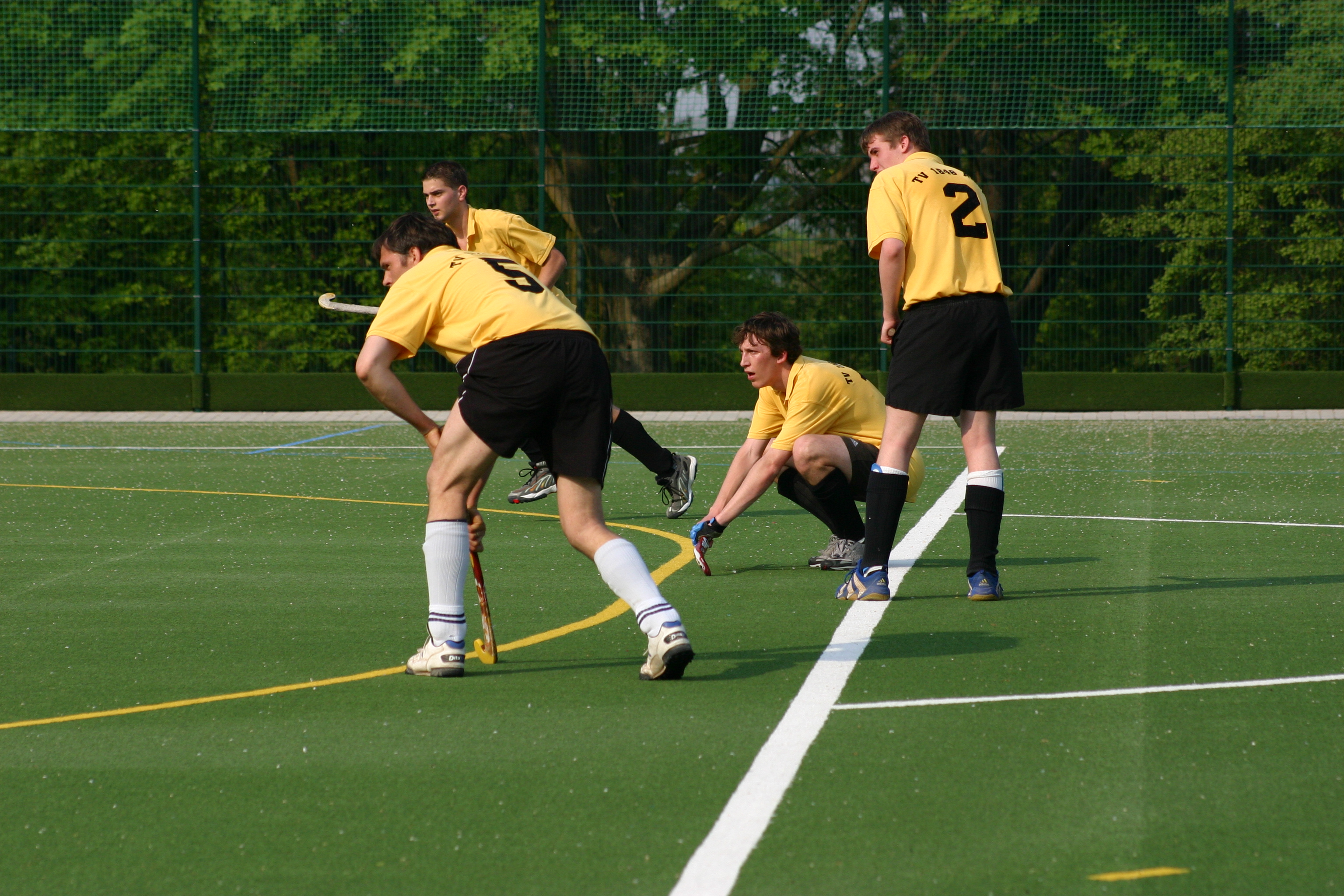 Ein Feldhockeyspiel in Deutschland, die angreifende Mannschaft bei einer Strafecke. Spieler: Nr. 5: Ablage Nr. 2: Schütze, davor Stopper rechts davon: zusätzlicher Spieler, der für einen „Stecher“ in den Kreis läuft Nicht im Bild: Reingeber Dies ist nur eine von vielen möglichen Eckenvarianten.